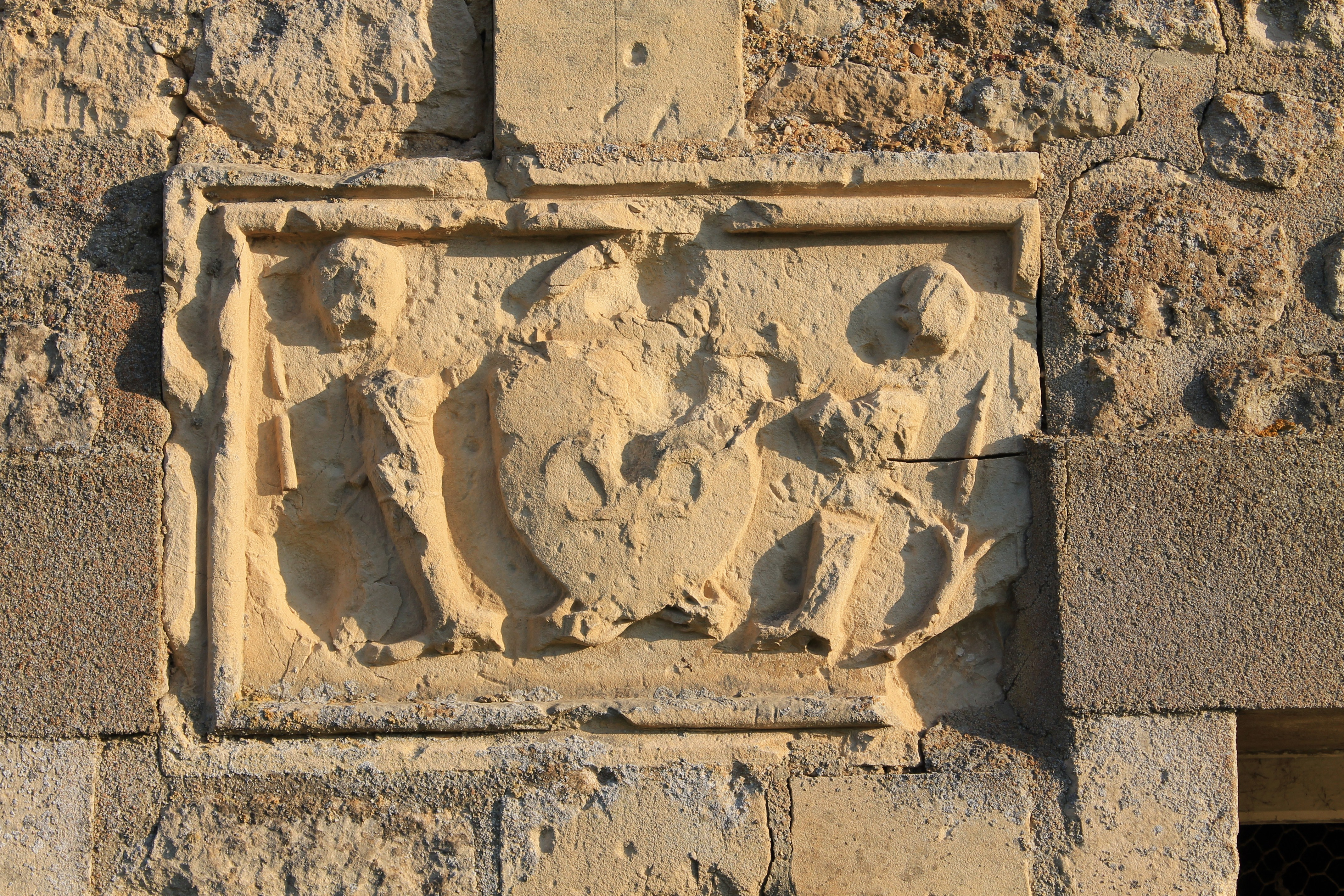 Bas-relief représentant deux chevaliers et un blason commémorant le passage de l'Orne au gué d'Athis et le massacre par Guillaume-le-Conquérant des barons normands conjurés vaincus à la bataille de Val-ès-Dunes en 1047. Ferme d'Athis, commune de Louvigny (Calvados)